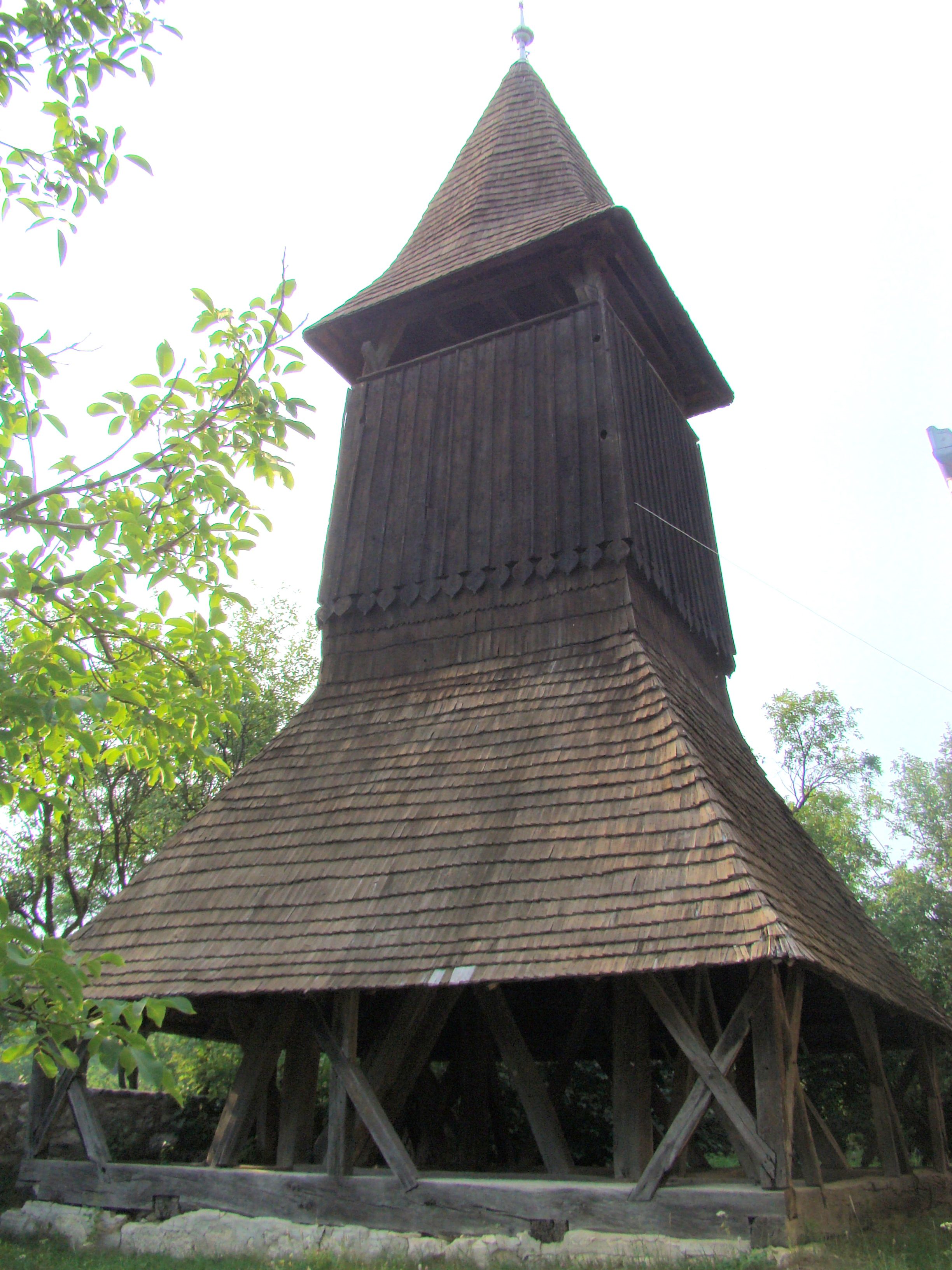 Clopotnița de lemn, sat Petrindu; comuna Cuzăplac 02